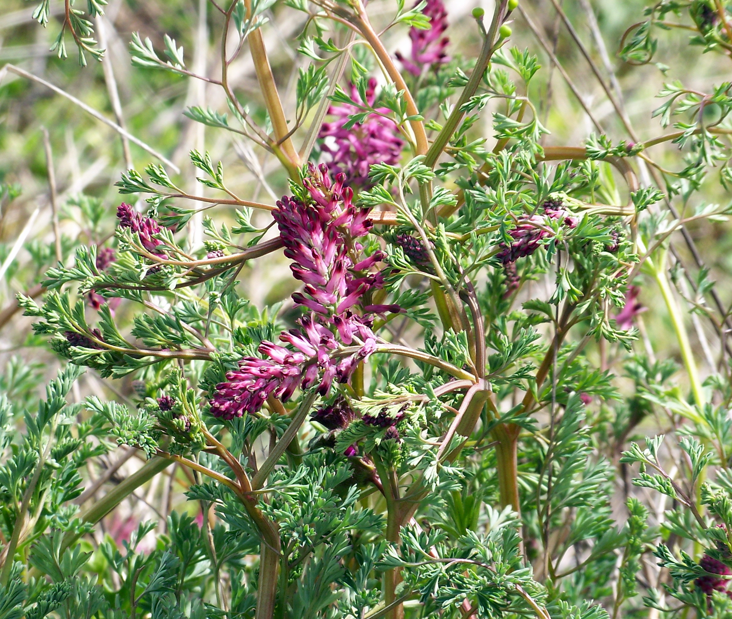 Fumaria officinalis (Sangre de Cristo) : Aspecto general en floración - Prado de Rejas (Madrid-Barajas, España).